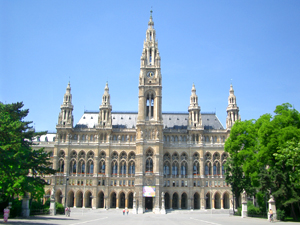 Wiener Rathaus (größere Version) Photograph: Friedrich Kromberg Copyright Status: GNU Freie Dokumentationslizenz Originalversionen auf Anfrage erhältlich